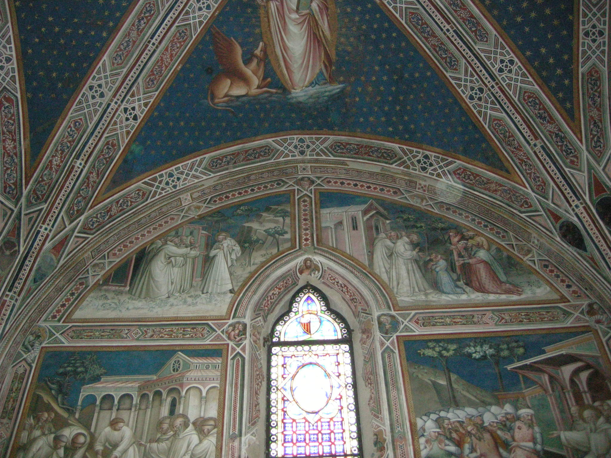 Spinello aretino, storie di san benedetto